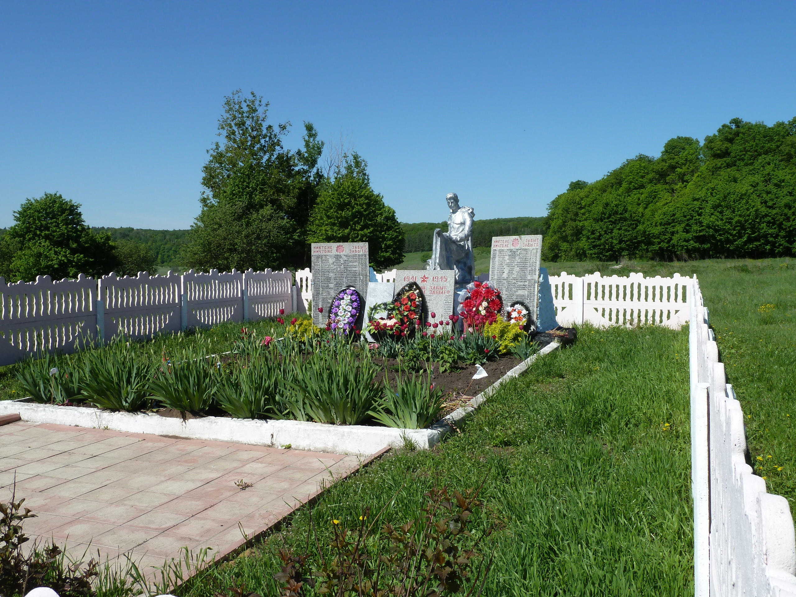 Воинское захоронение